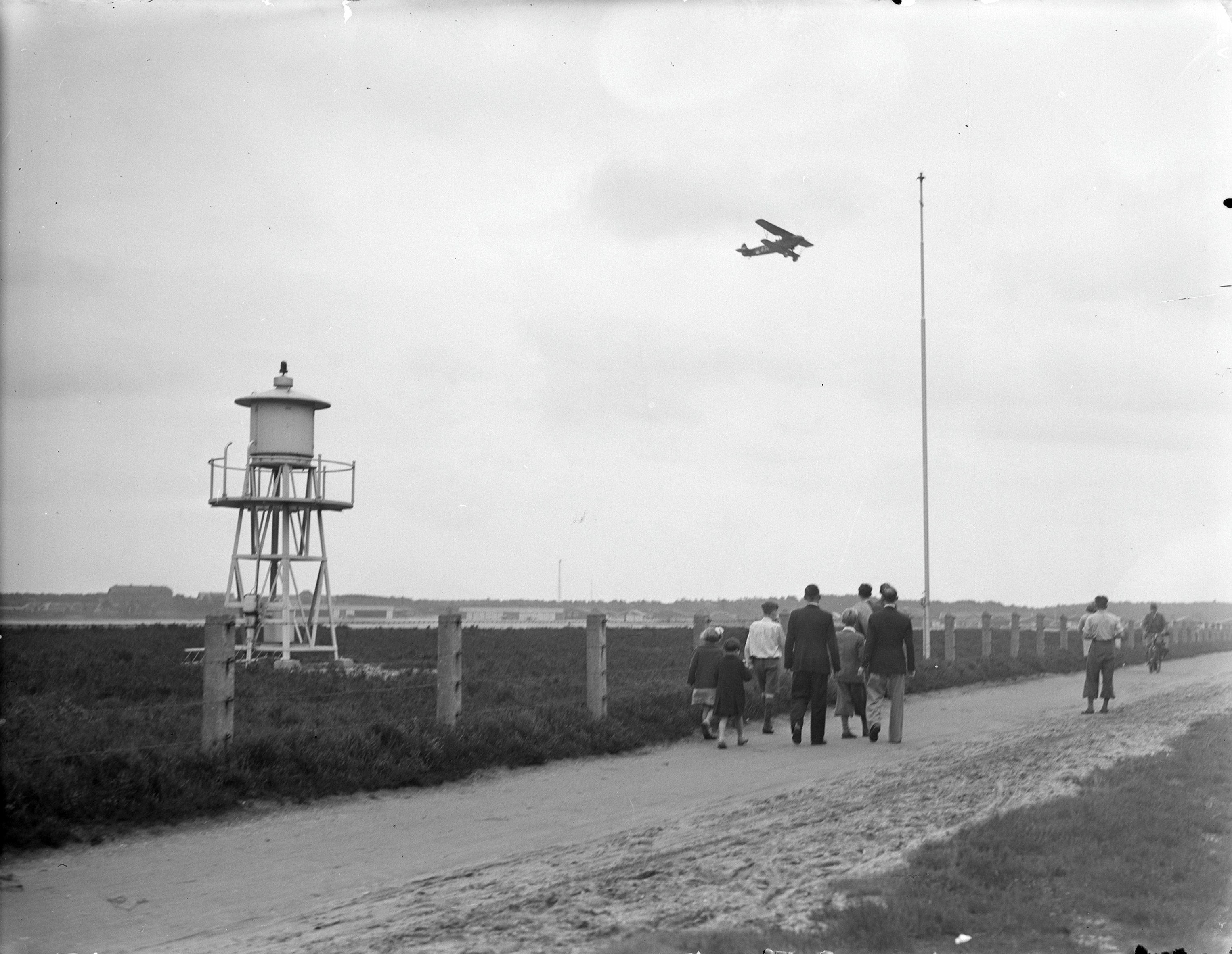 Vliegveld: Vliegveld Soesterberg (opmerking: Oorspronkelijk bijschrift: 'Vliegveld')